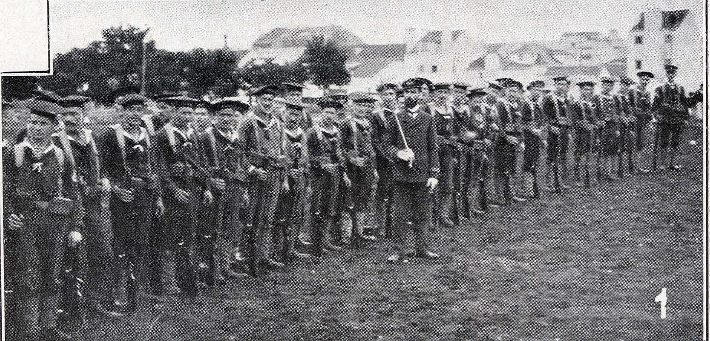 força de marinha que iria combater em Angola os Cumatas. Foto tirada na Terra do Desembargador, Belém (Lisboa)